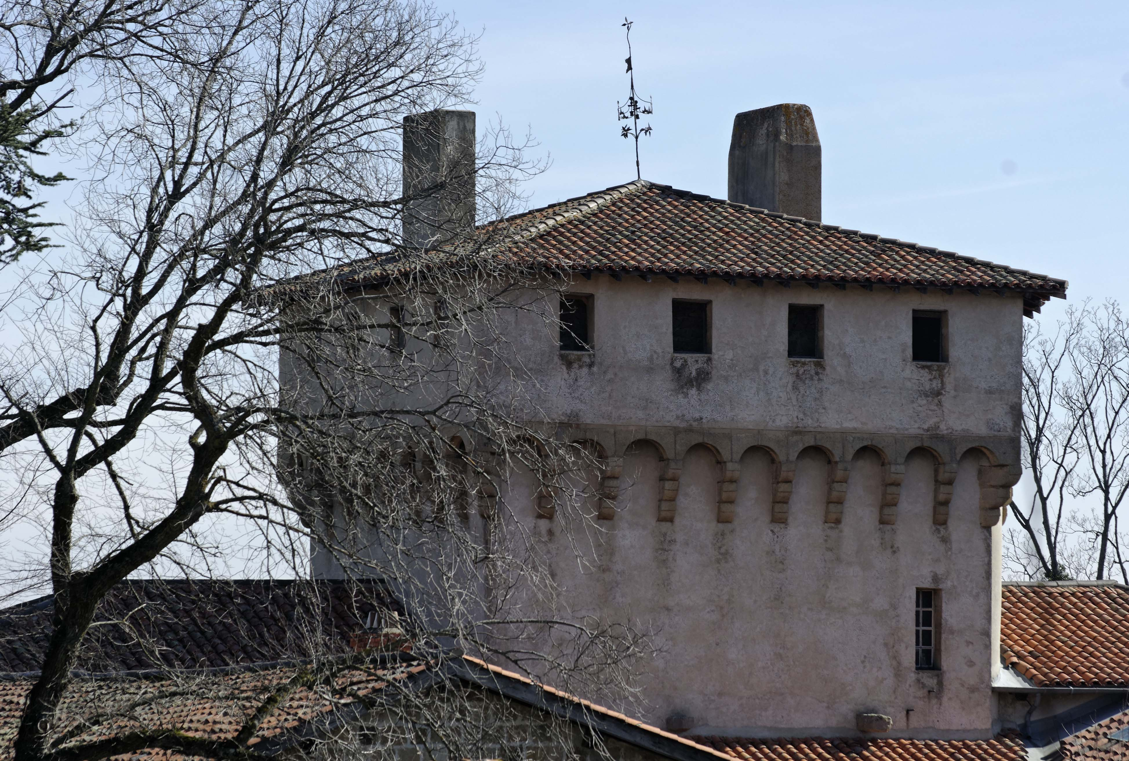 Château de Chenereilles, (ClasséInscrit, 19831983) This building is en partie classé, en partie inscrit au titre des Monuments Historiques. .